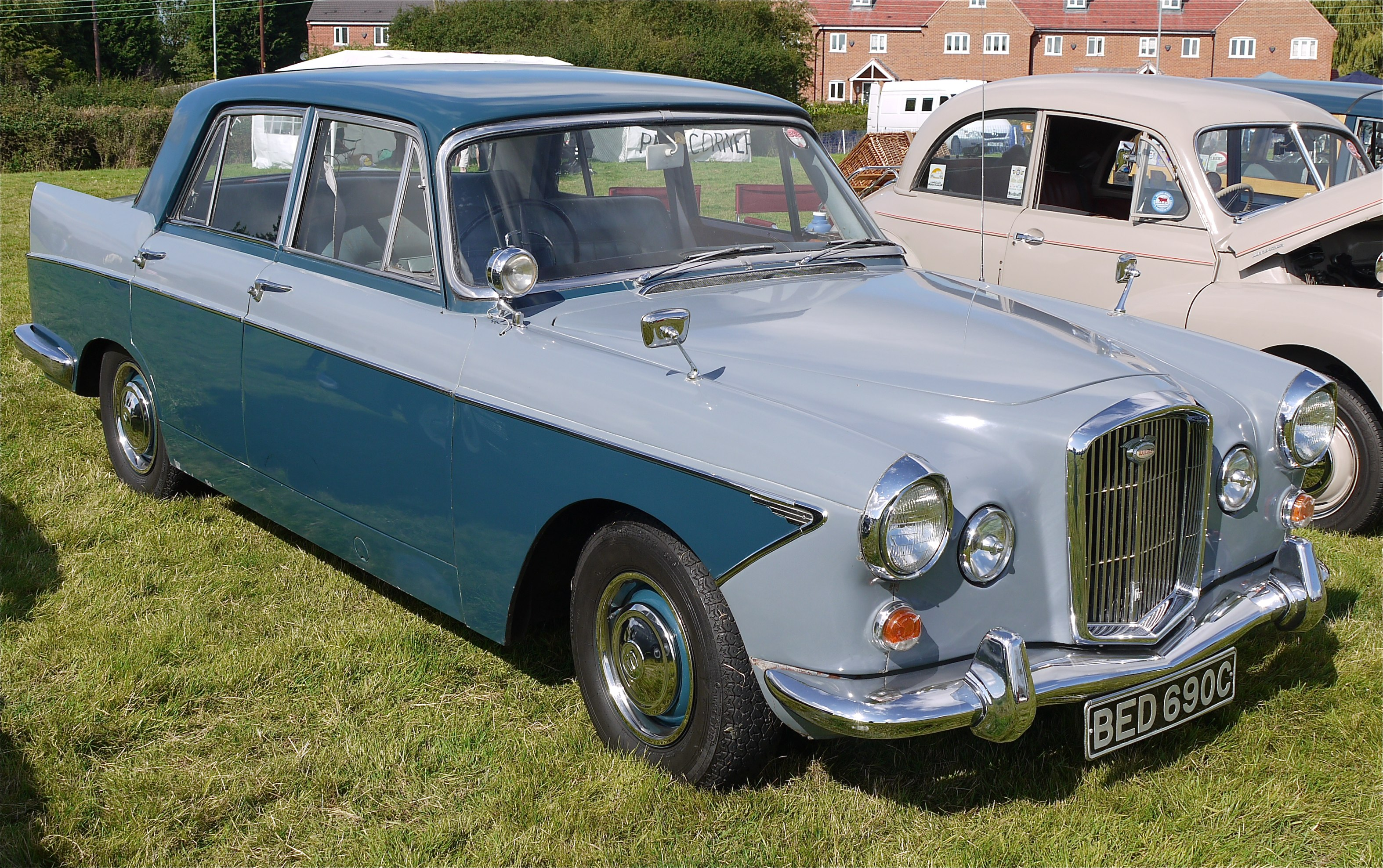 Panasonic G1 14-45 Lens